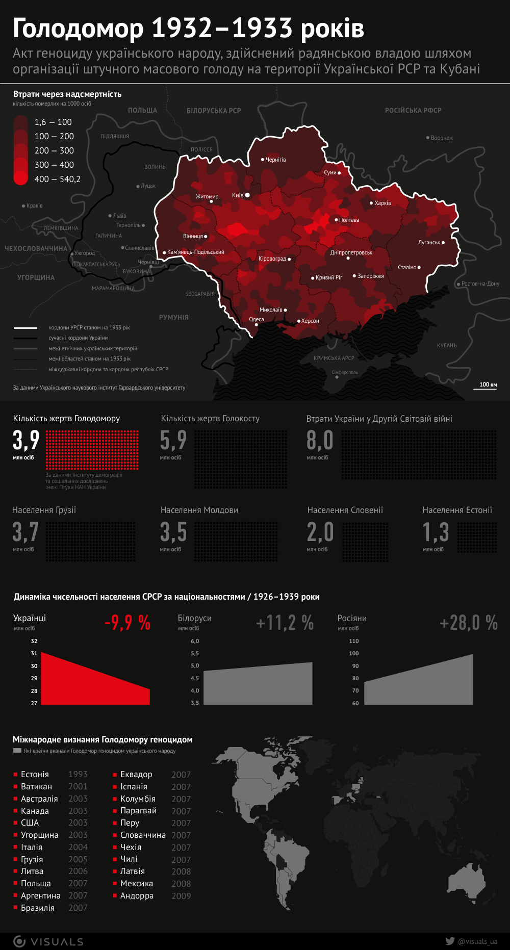 Голодомор в Україні 1932-1933. Інфорграфіка від Visuals. Матеріали, що містять логотипи «Visuals» та «Infographics [UA]», поширюються під ліцензією CC-BY-SA 4.0.